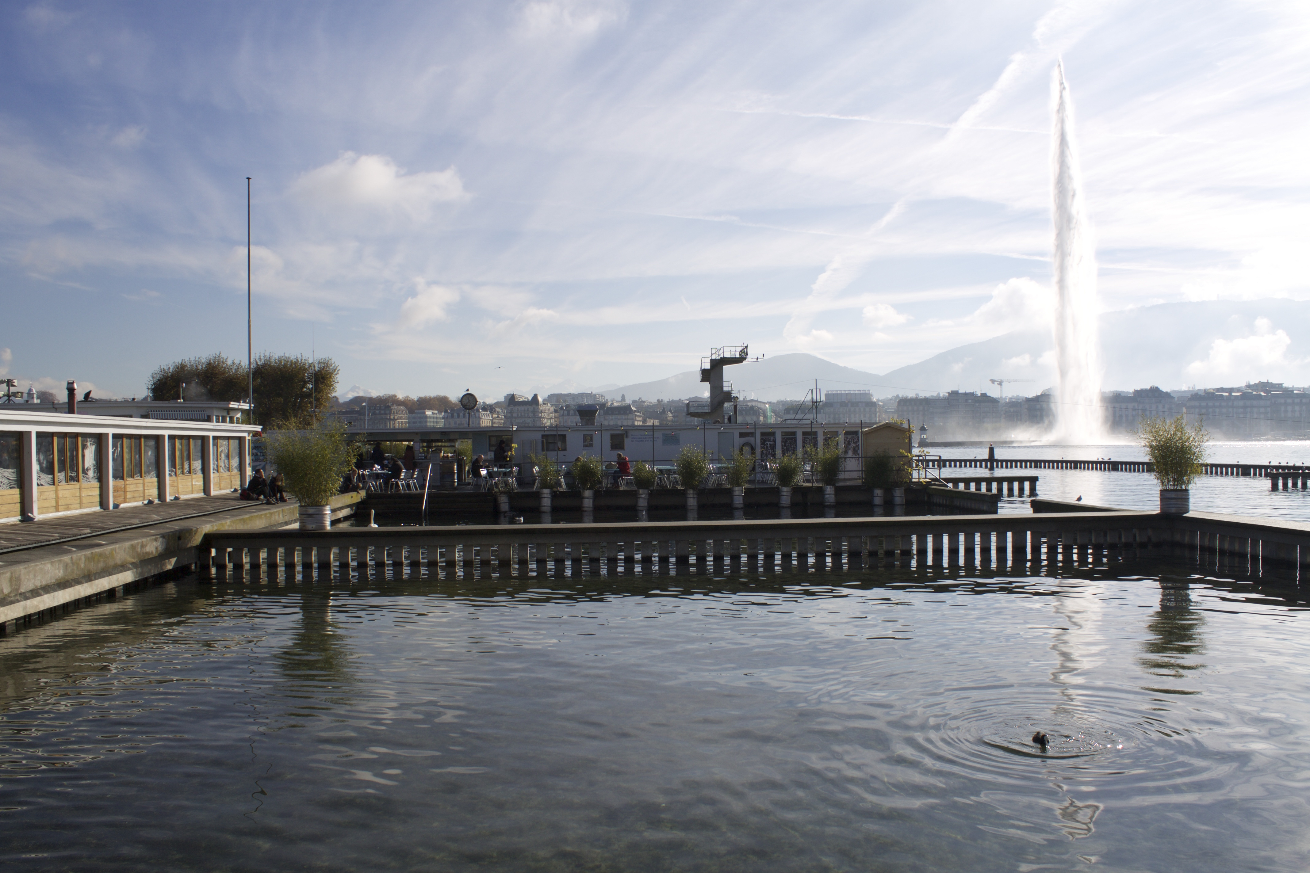 Genève